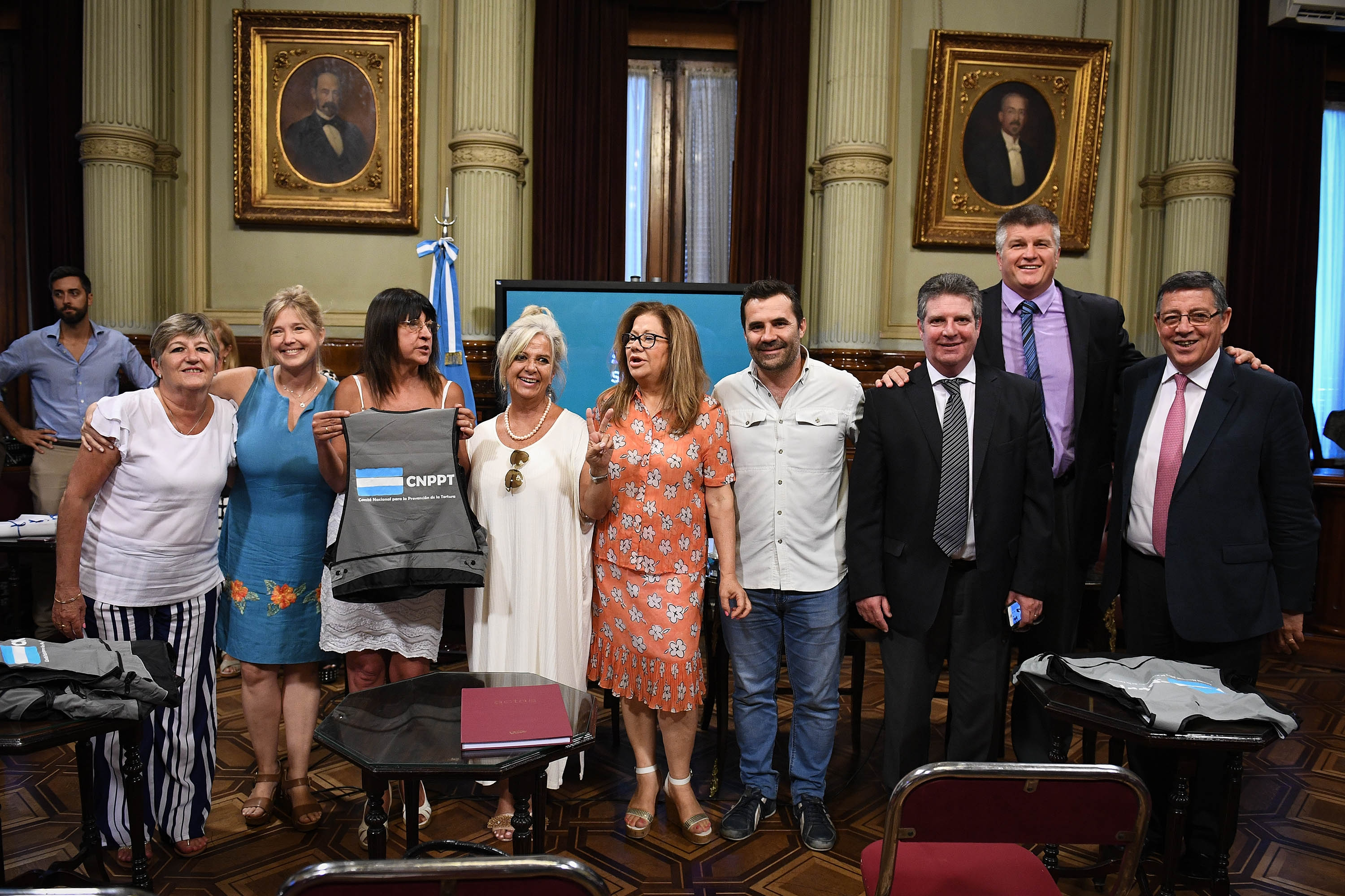 El Congreso constituyó el comité de lucha contra la tortura. El acto constitutivo tuvo lugar este mediodía en el Salón Arturo Illia durante un encuentro de la Comisión Bicameral de Defensoría del Pueblo, en el que estuvieron presentes el presidente provisional del Senado, Federico Pinedo y el secretario de Derechos Humanos de la Nación, Claudio Avruj. Algunos de los miembros del Comité serán los legisladores María Laura Leguizamón, Juan Irrazabal, Rocío Alconada Alfonsín, Diana Conti y Jorge D'Agostino.